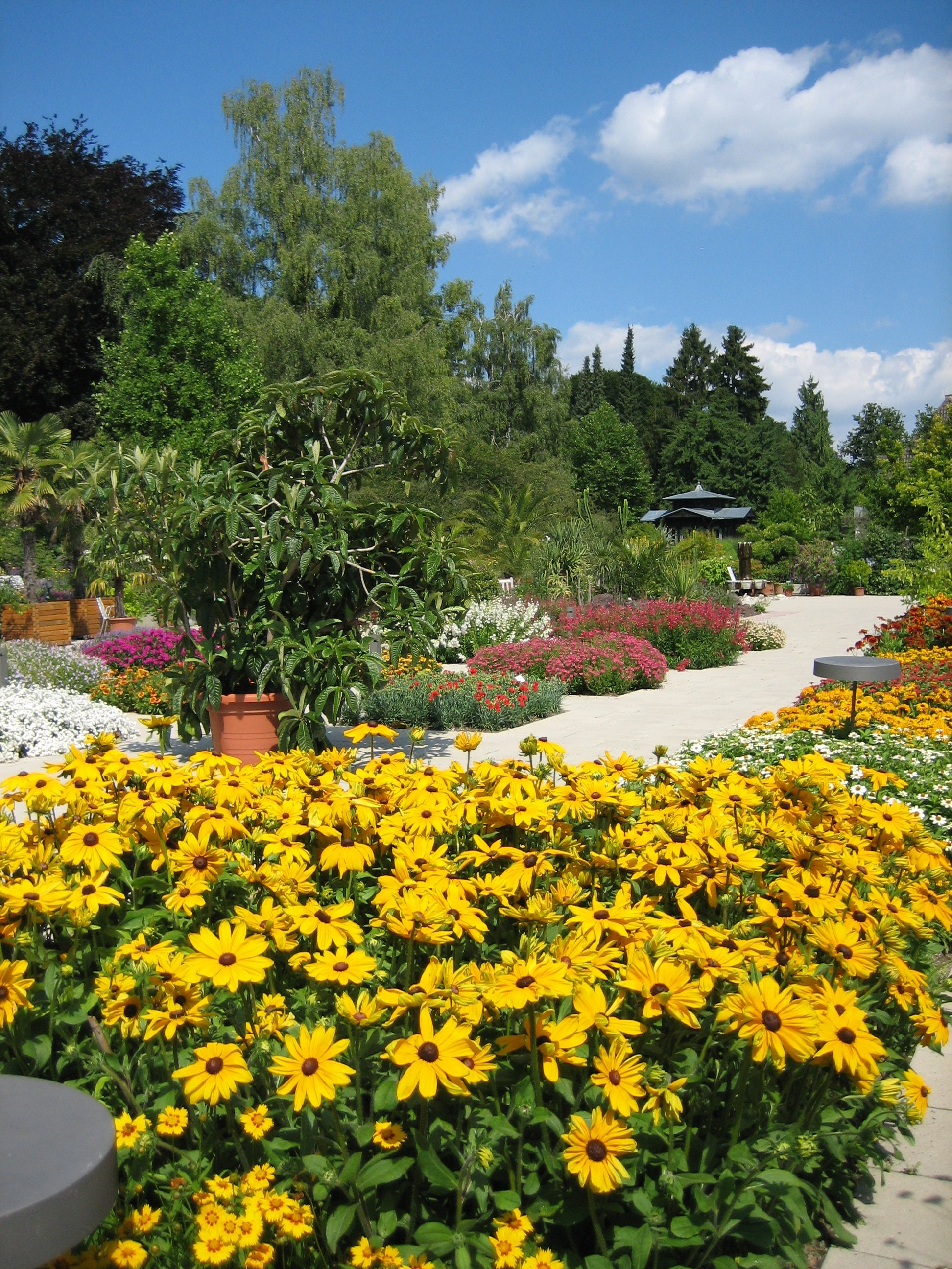 Botanischer Garten in Augsburg, Blütenpracht im Senkgarten